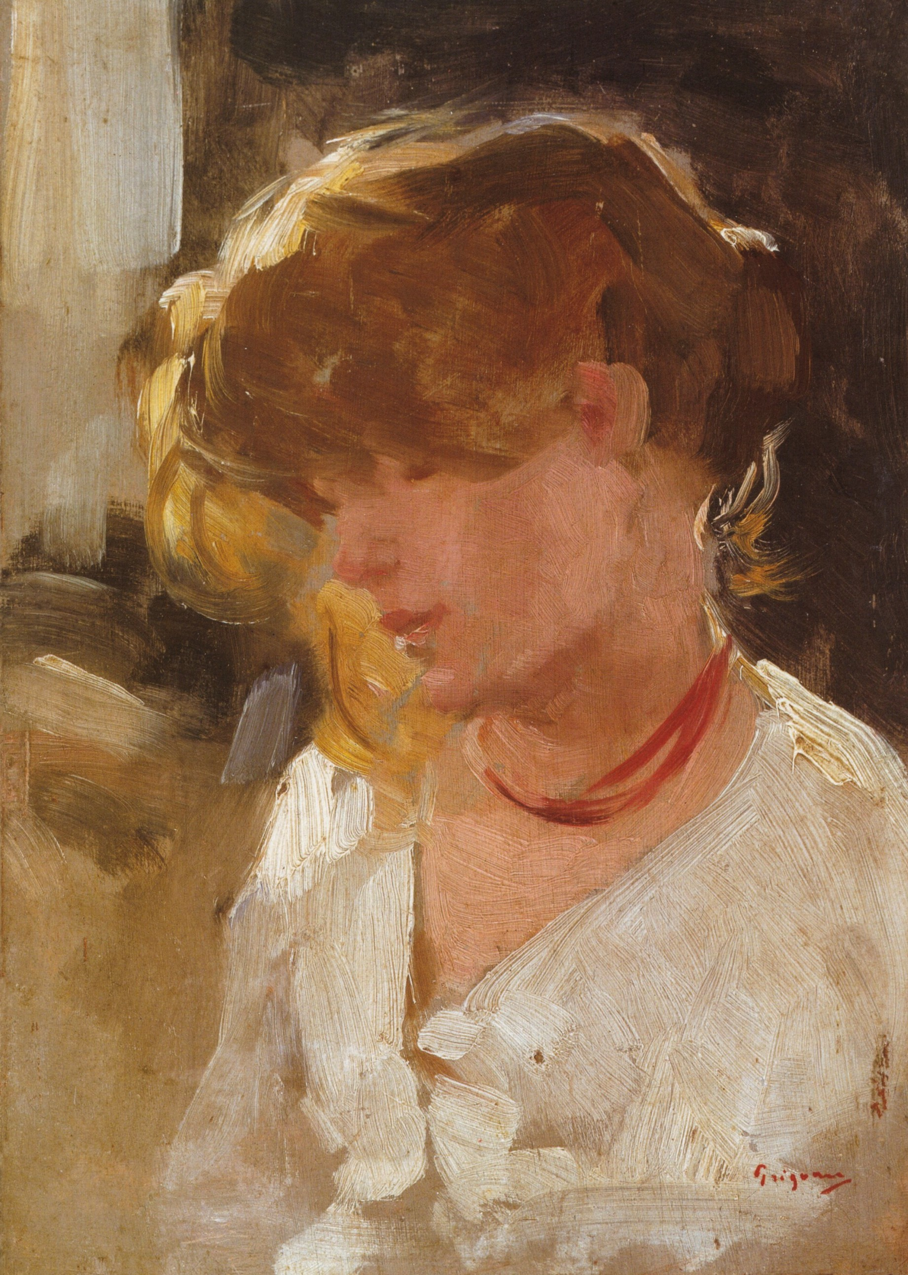 Cap de ţărancă, ulei pe lemn, 26.3x17.2cm, semnat dreapta jos cu roșu: Grigorescu, nedatat - Muzeul de Artă Ploieşti